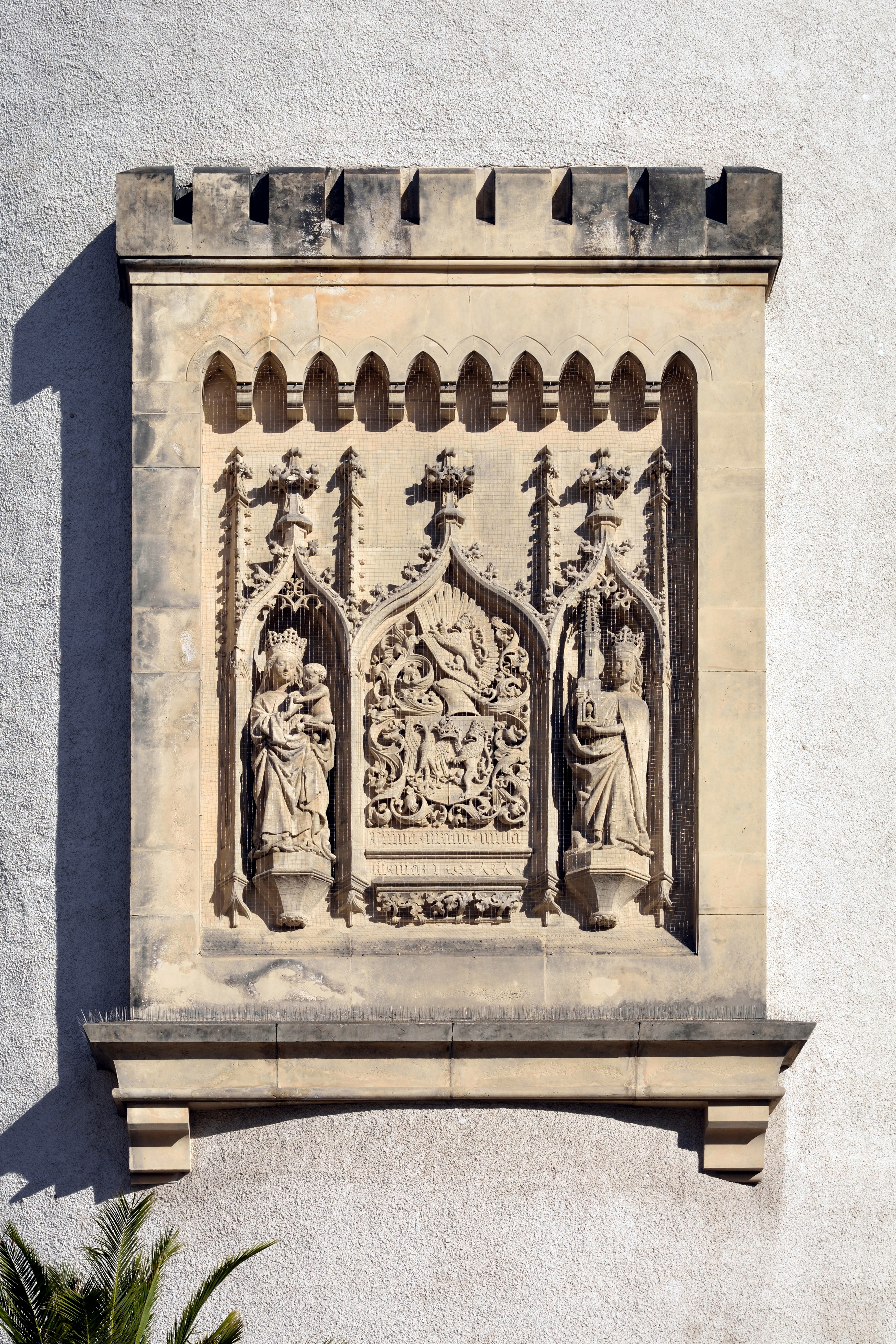 Impressionen einer GLAM on Tour (2018) im Senckenberg Museum für NaturkundeHier: Bild vom "Dicken Turm", in Sichtweite vom Museum.